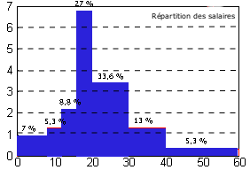 Exemple d'histogramme. Image personnelle créée avec gnuplot et gimp.